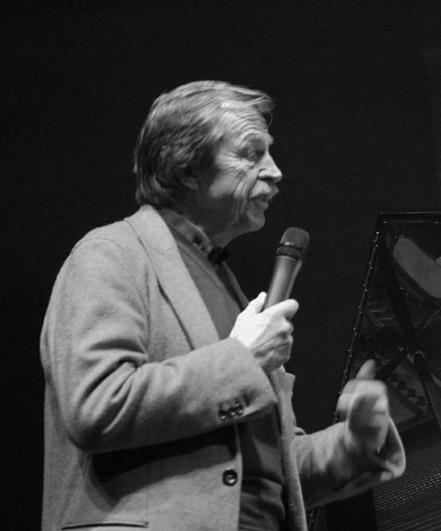 Siegfried Loch beim St. Ingberter Jazzfestival